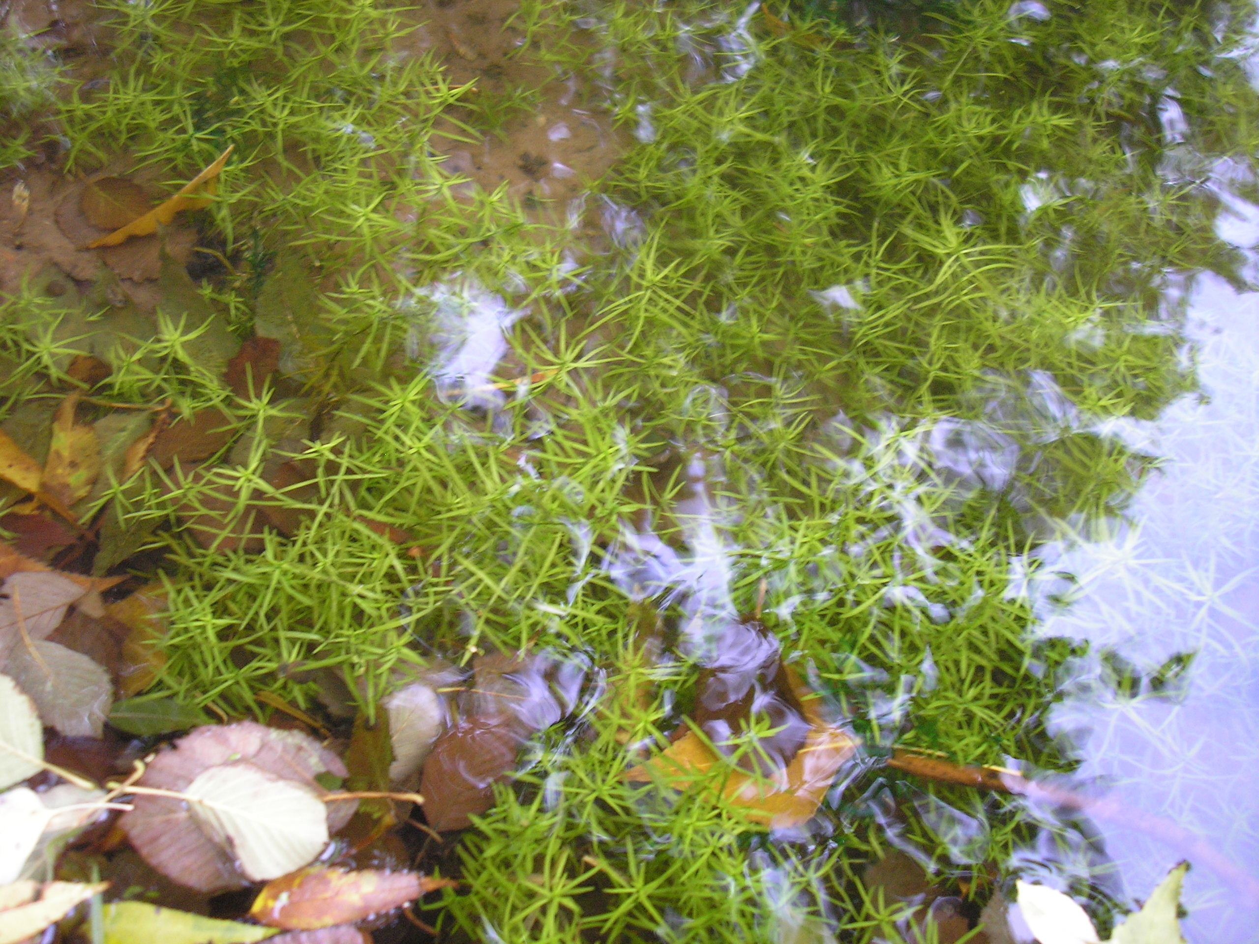 Pod ledem přezimující lodyha rdestice.